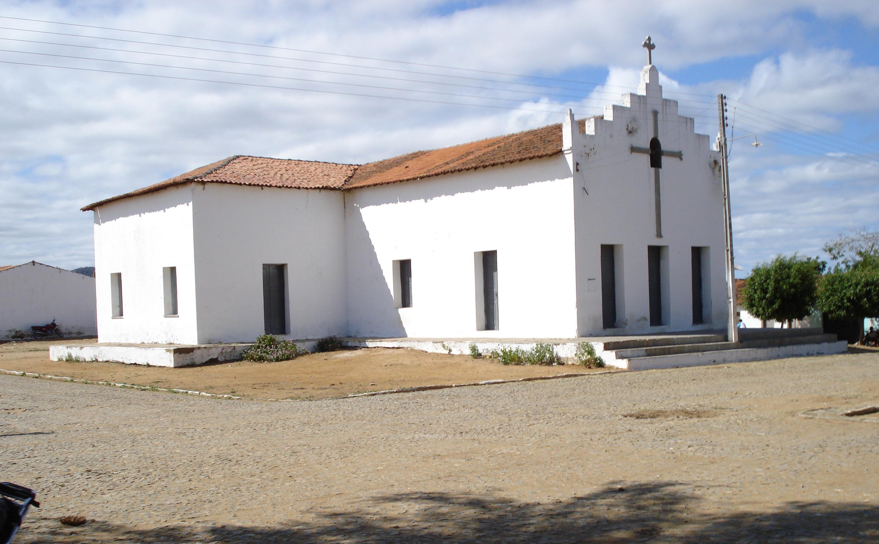 Capela do Distrito de São João dos Queiroz, Quixadá, Ceará.